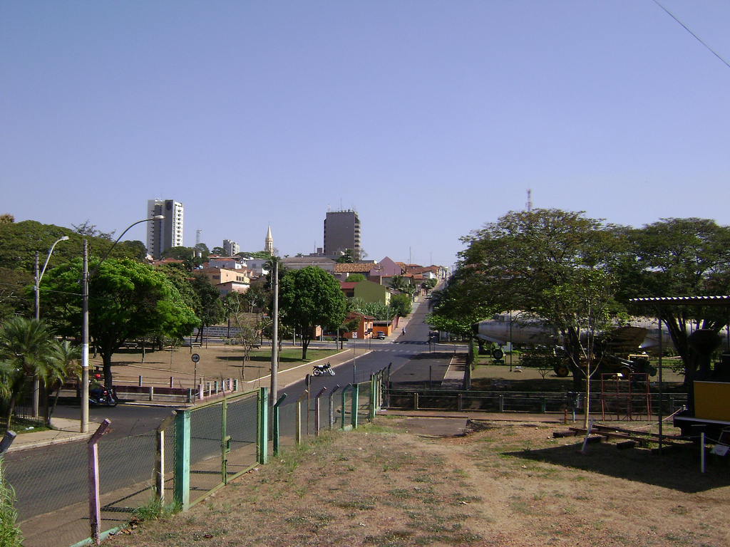 Cidade de Bebedouro vista a partir do Museu Eduardo André Matarazzo.